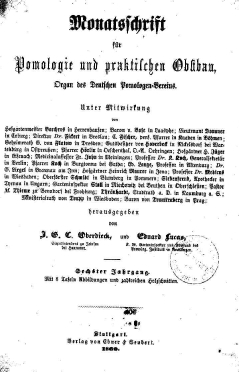 Titelblatt der Monatsschrift für Pomologie1860